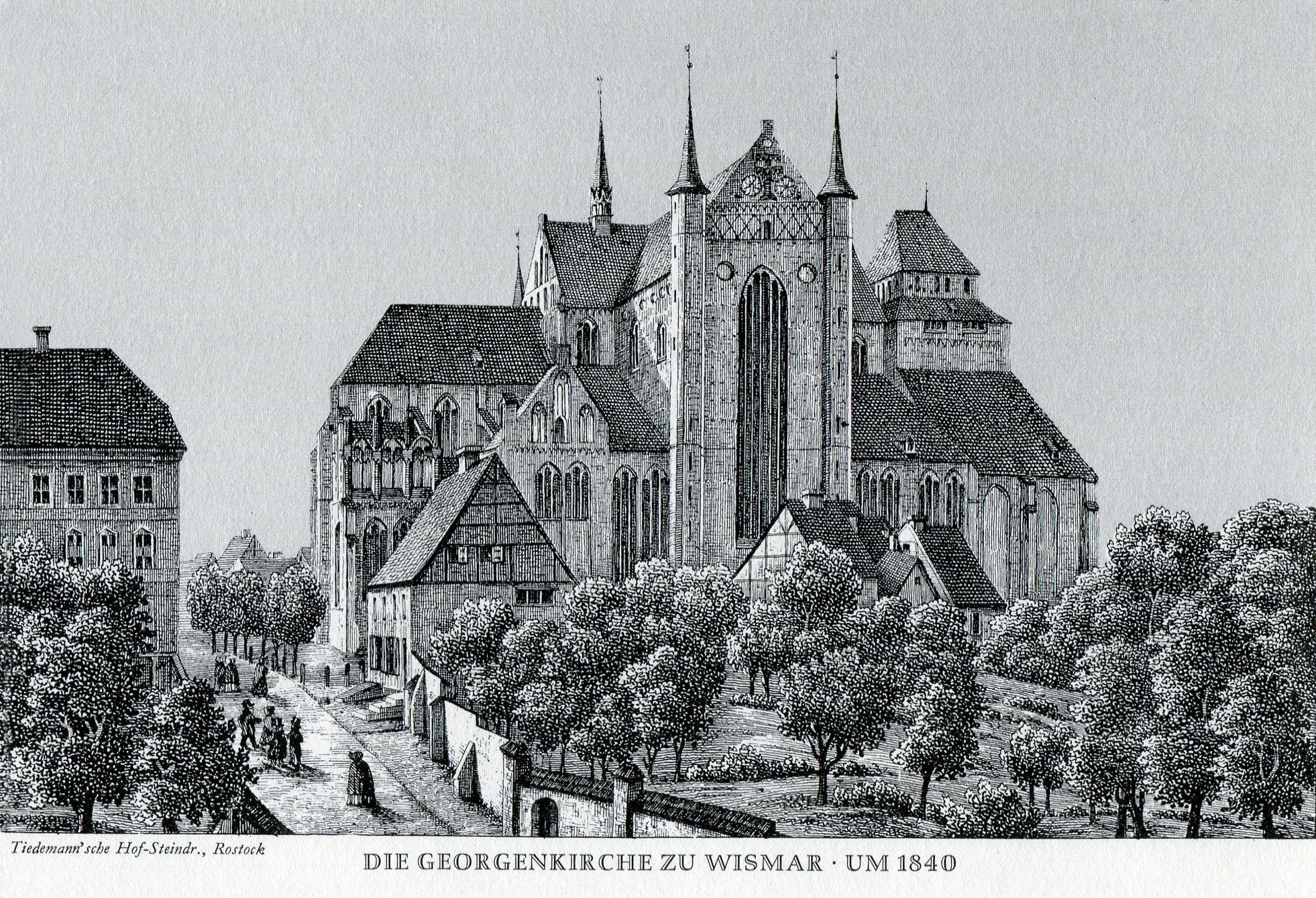 Wismar, Georgenkirche - Steindruck